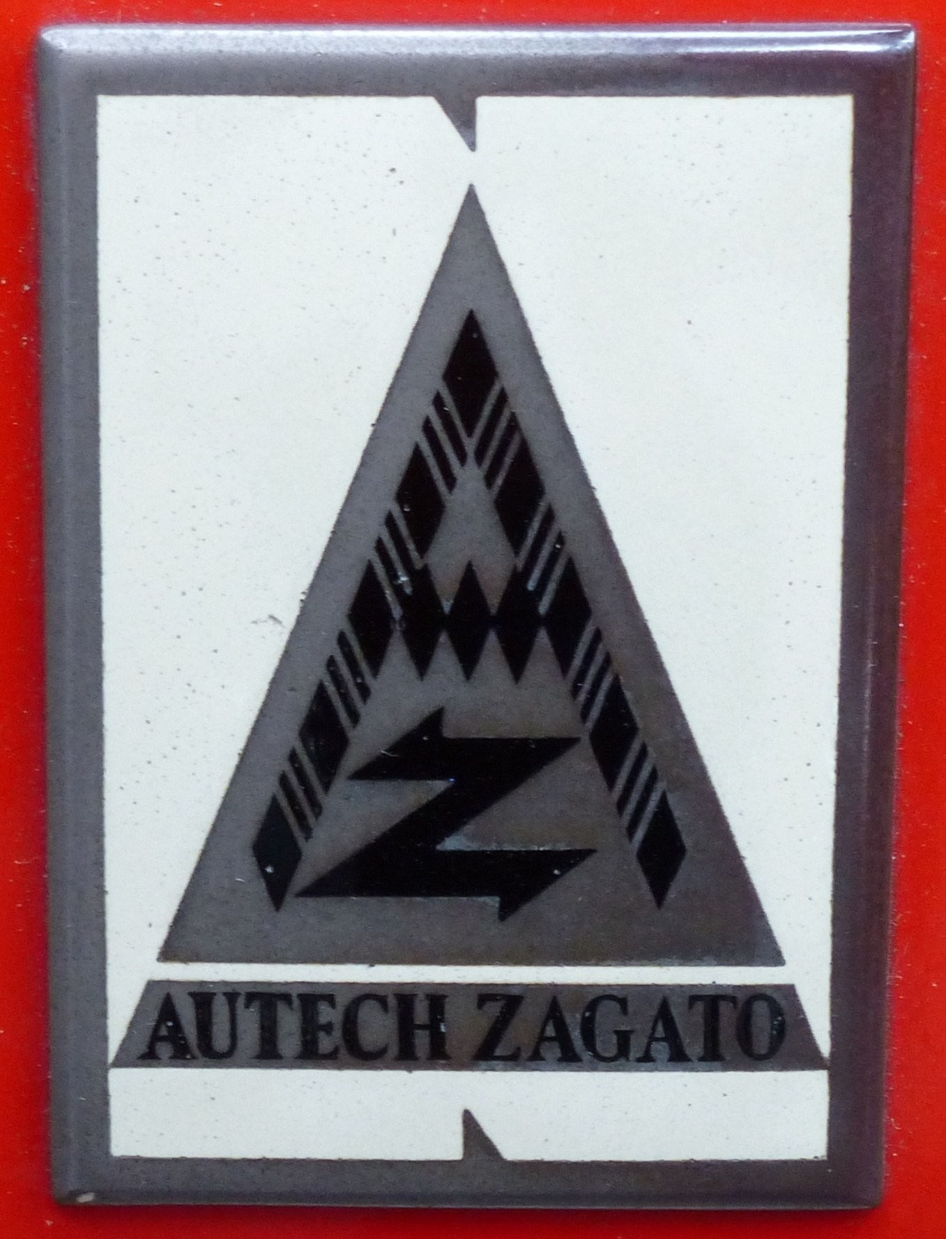 Emblem Autech